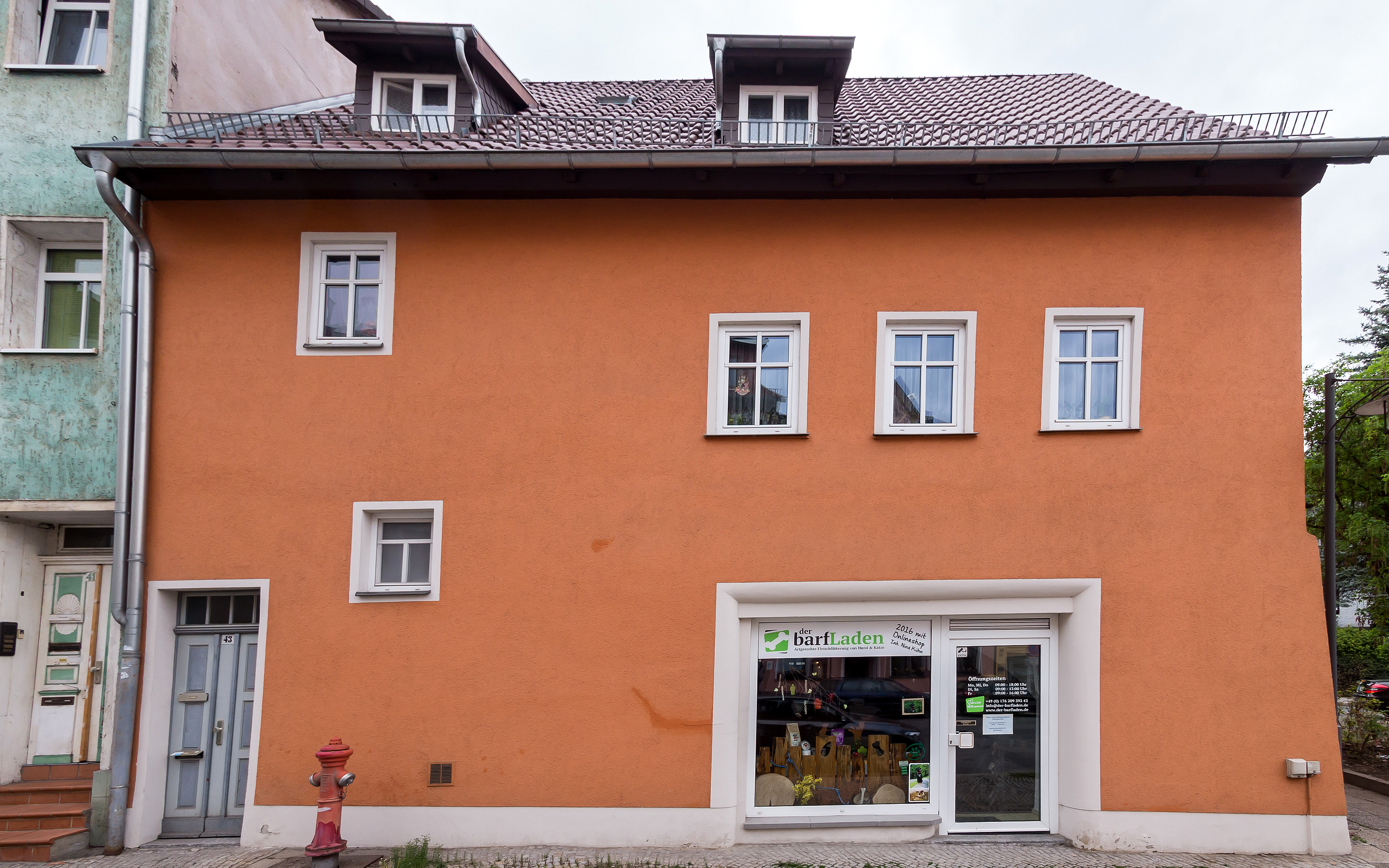 Saalfeld Saalstraße 43 Wohn- und Geschäftshaus II